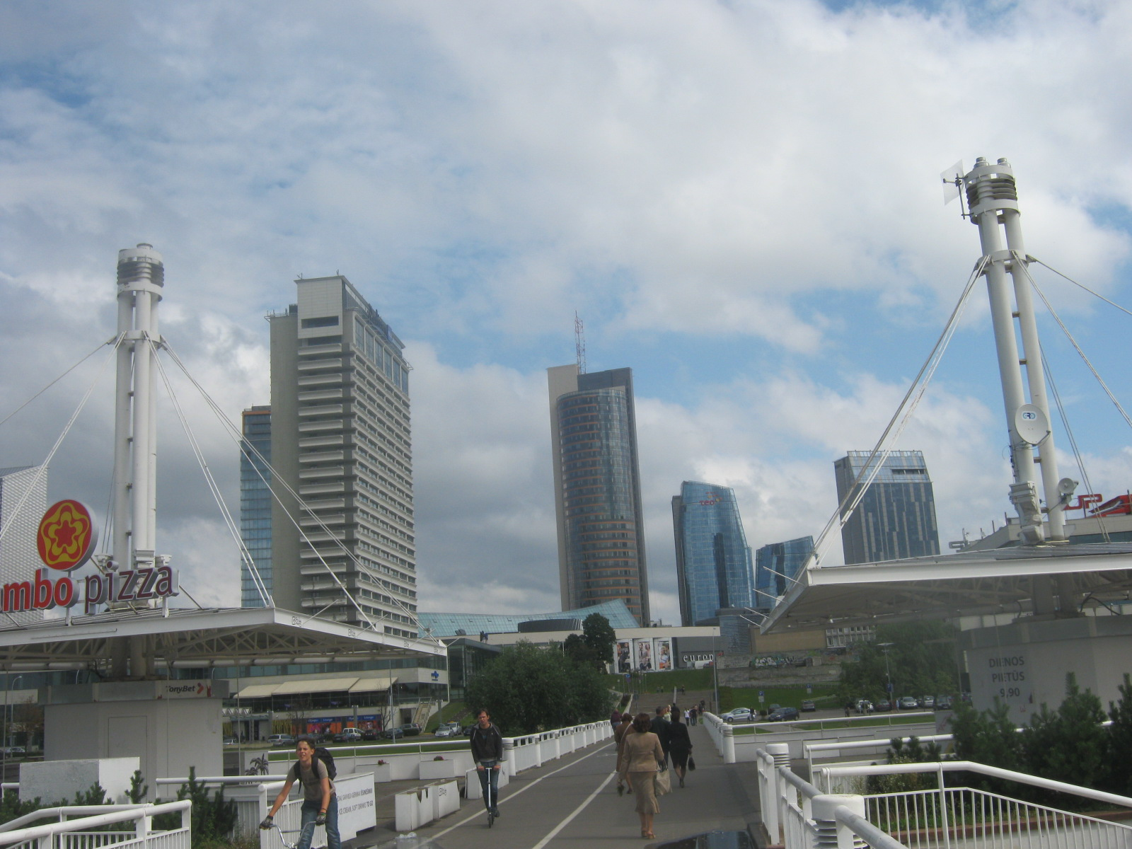 Vilnius